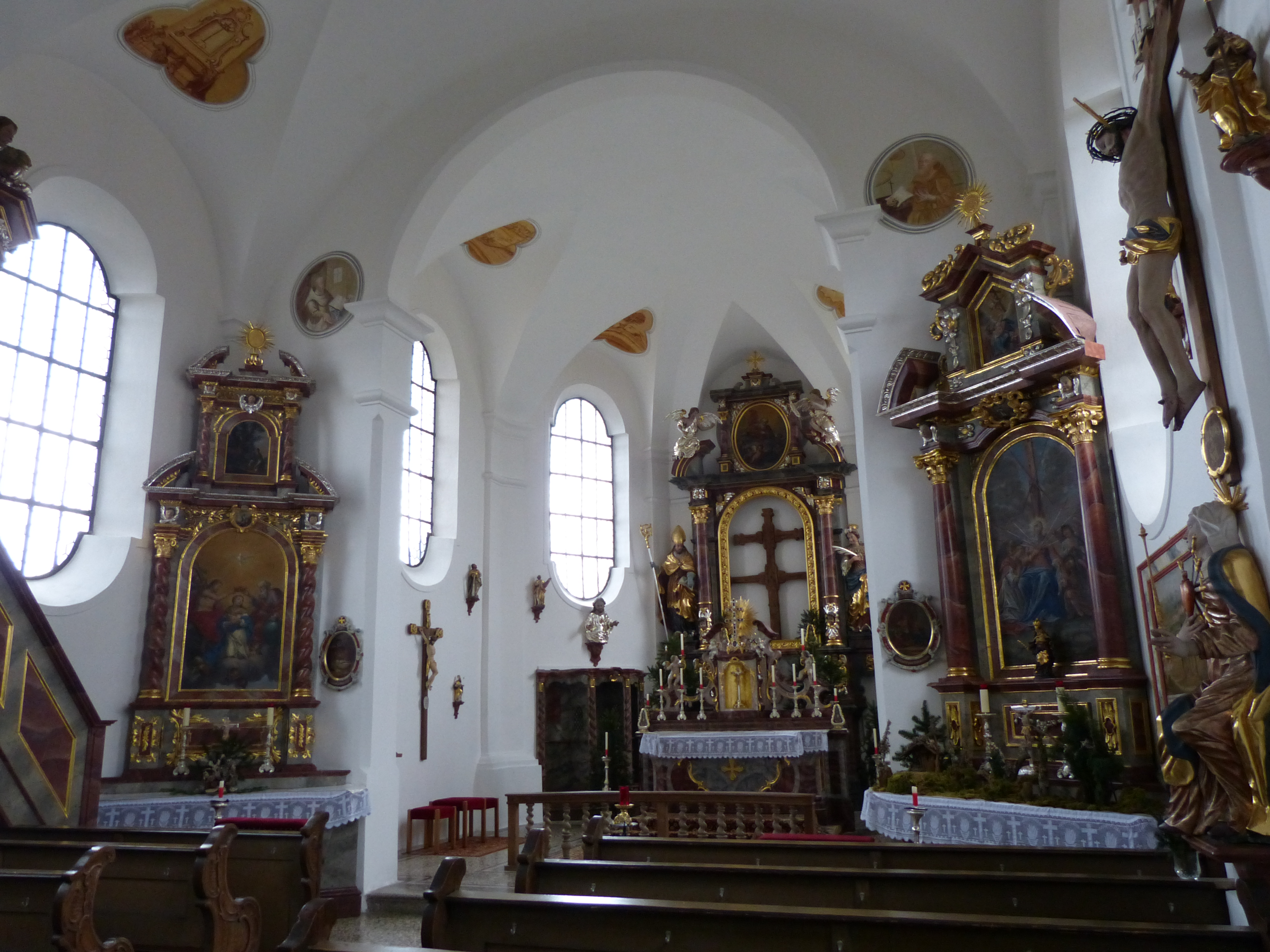 Zum Heiligen Kreuz, Pleß, Landkreis Unterallgäu, Bayern